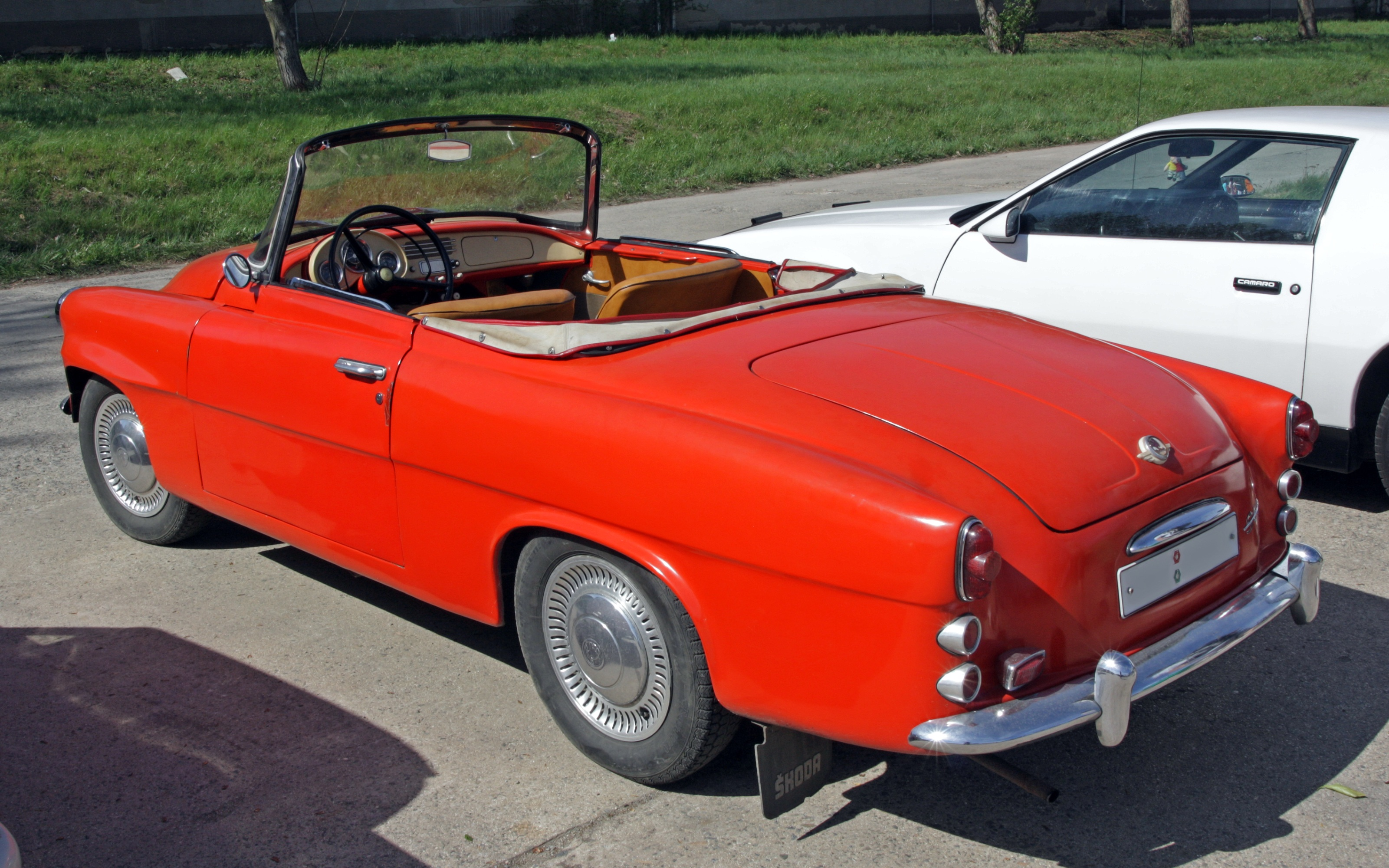 Škoda 450.